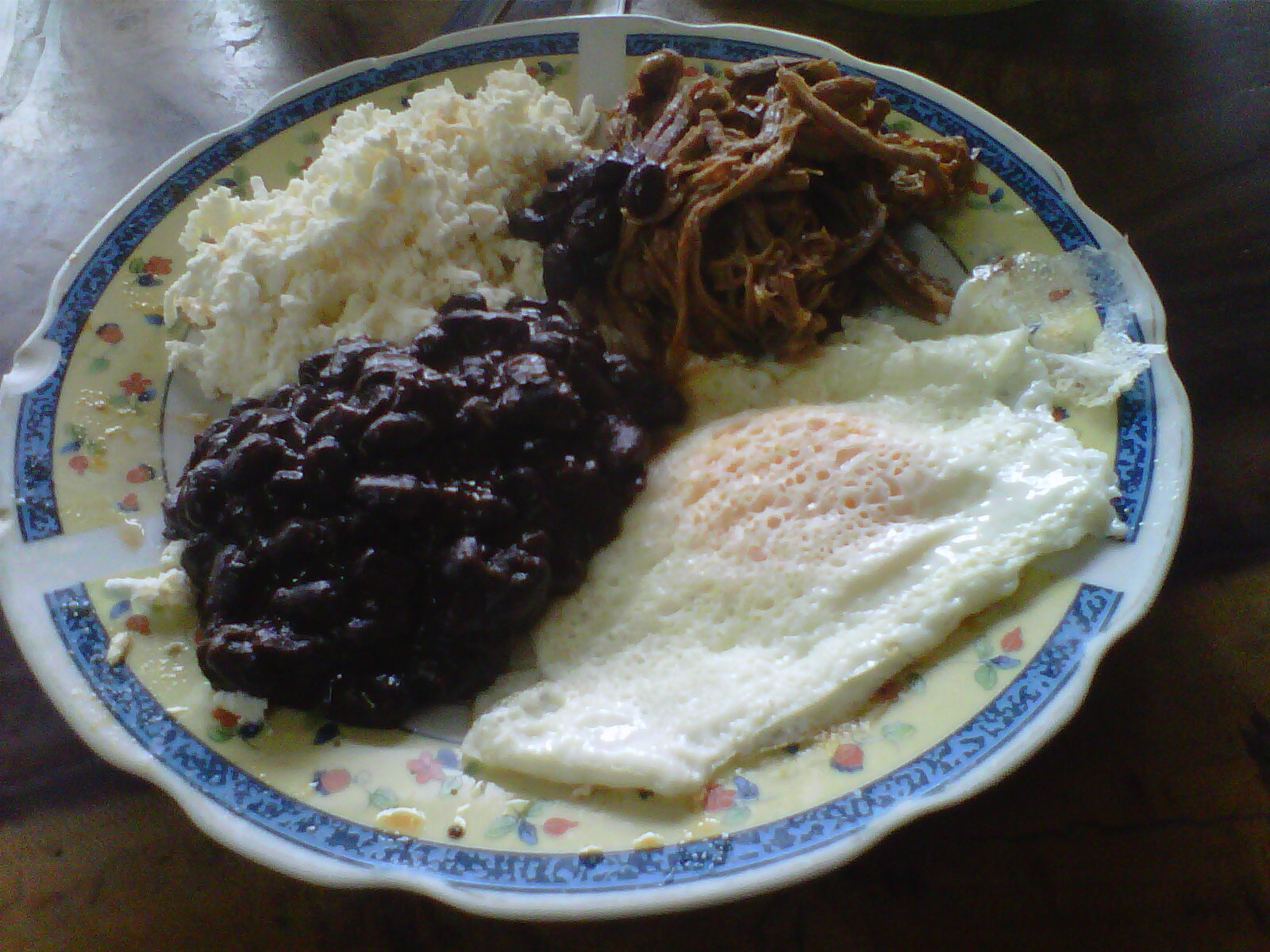 EN LA CARRETERA TRUJILLO A BOCONÓ, PARAJES PARA DELEITAR DE UN TÍPICO DESAYUNO CRIOLLO